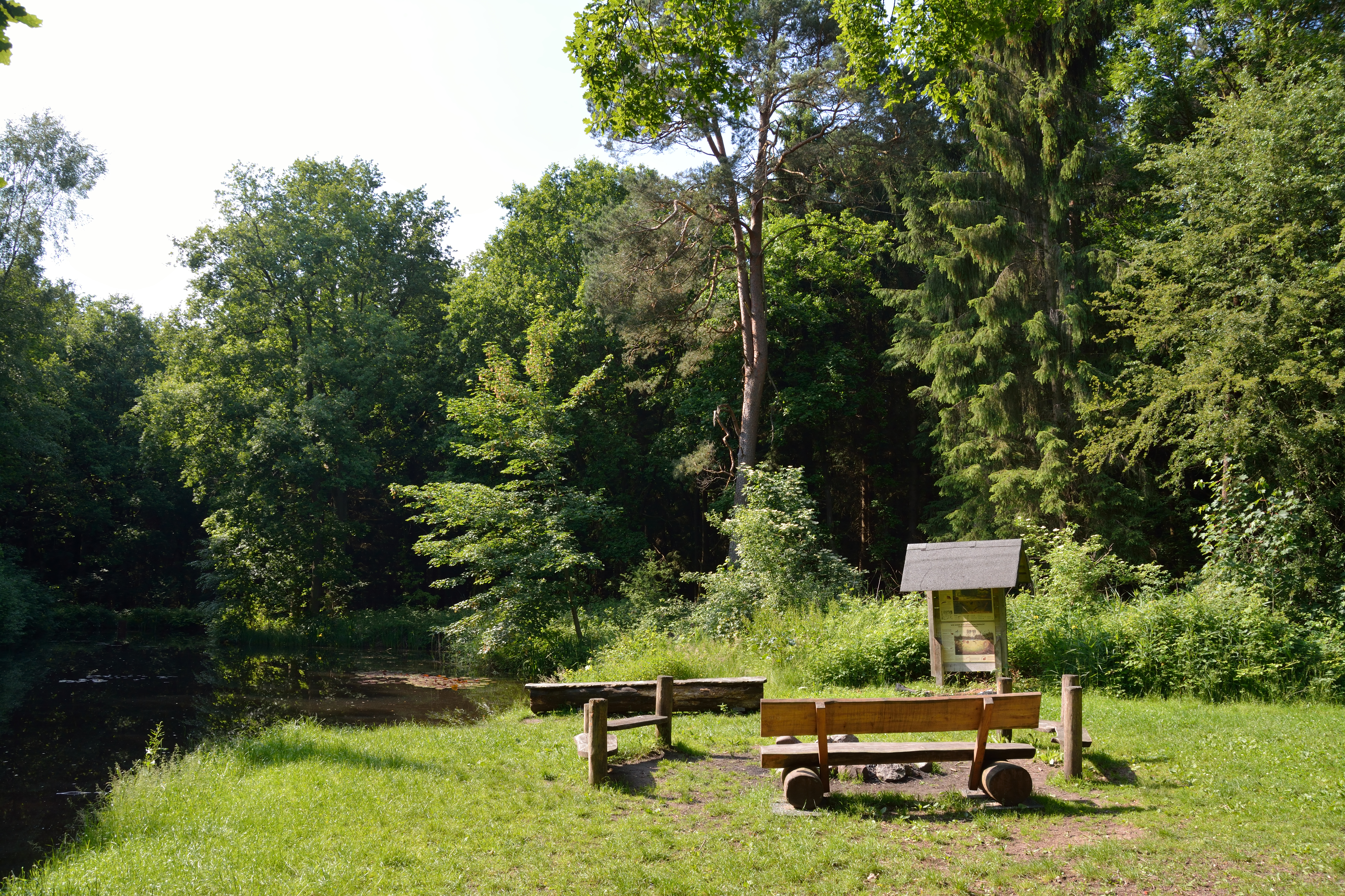 Impressionen von einem kleinen Grillplatz im Wald Hasselbusch bei Mönkloh.Zwischen zwei Teichen befindet sich ein gemauerter Grill, eine mit Steinen eingefasste offene Feuerstelle und mehrere Sitzmöglichkeiten. Allerdings keine Überdachung, bei Regen also... Auch befindet sich dort eine Quelle, die innerhalb des Waldes verrohrt ist und durch einen ausgehöhlten Baumstamm in die Teiche fliesst.